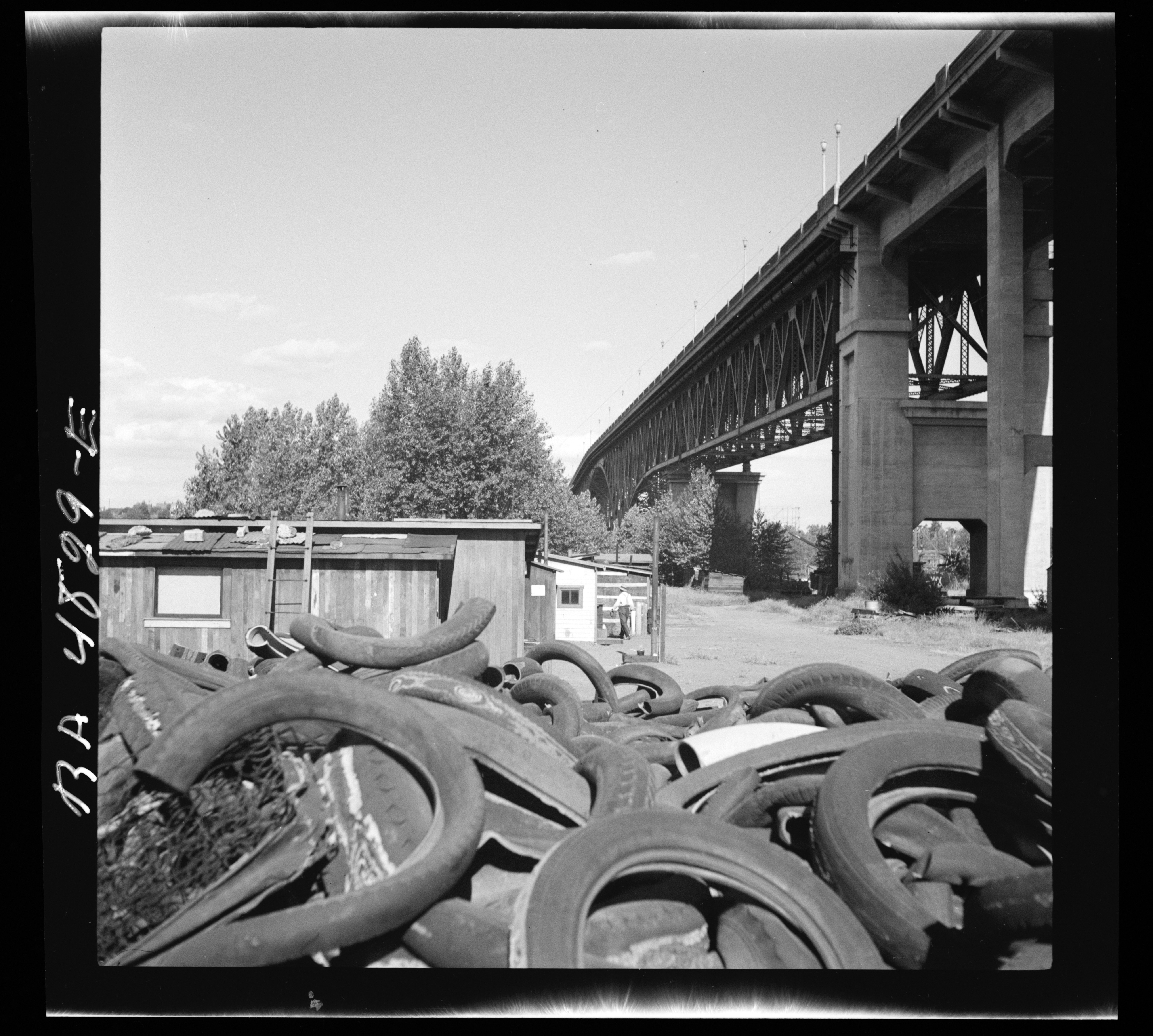 Hooverville. Portland, Oregon